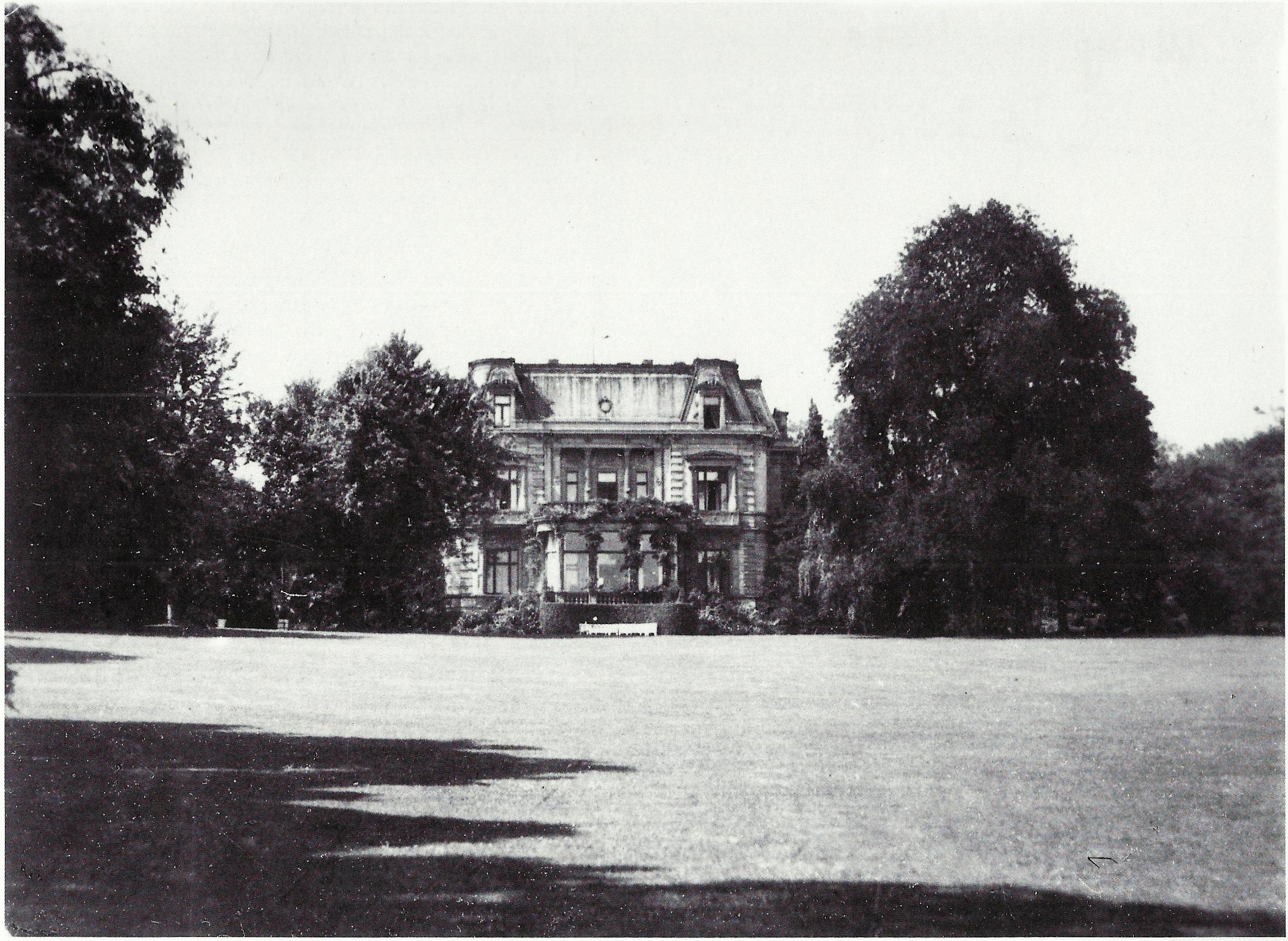 Villa Selve (1955 abgebrochen), Bonn: Rheinfront